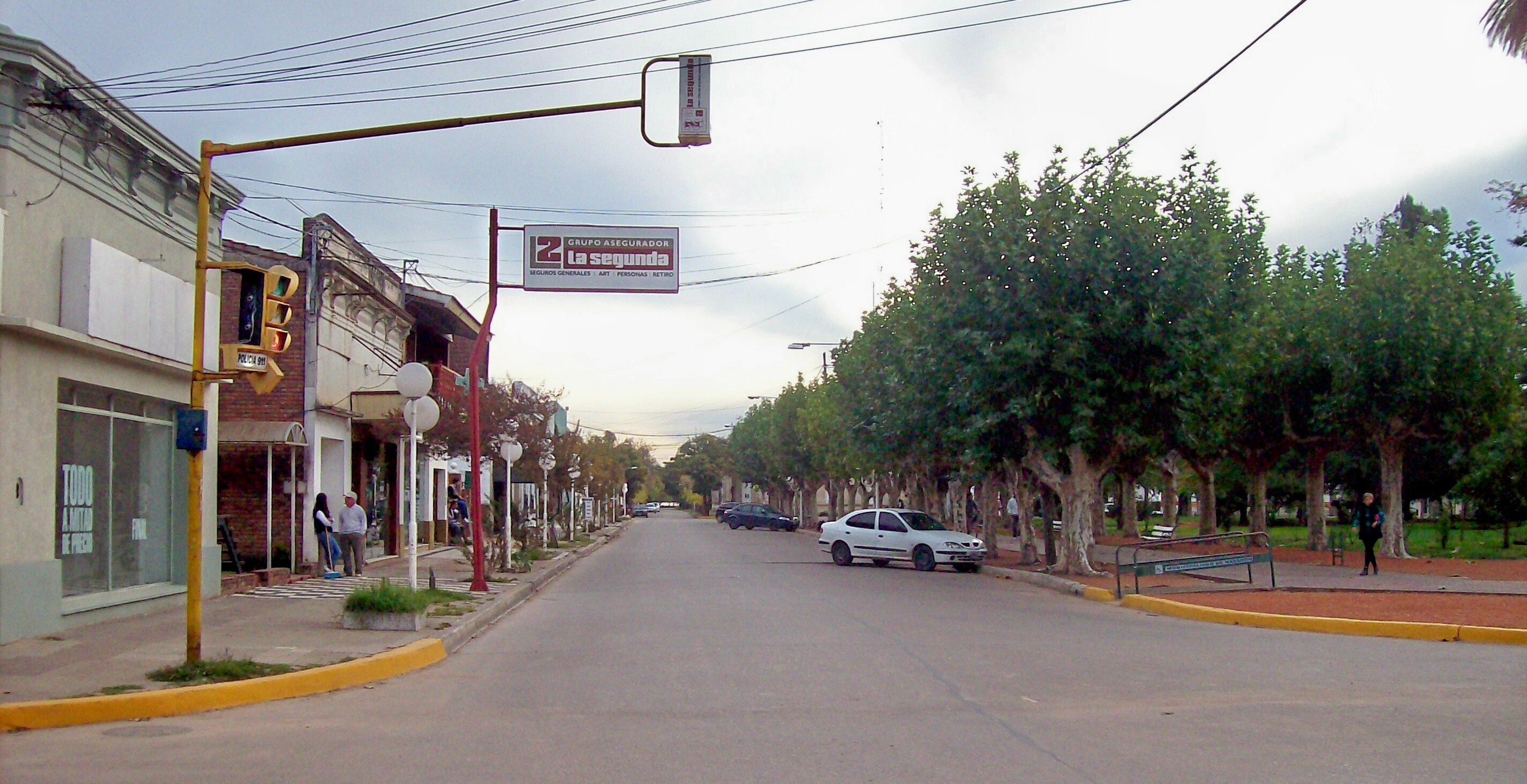 Centro de la localidad de Navarro, Provincia de Buenos Aires, Argentina.